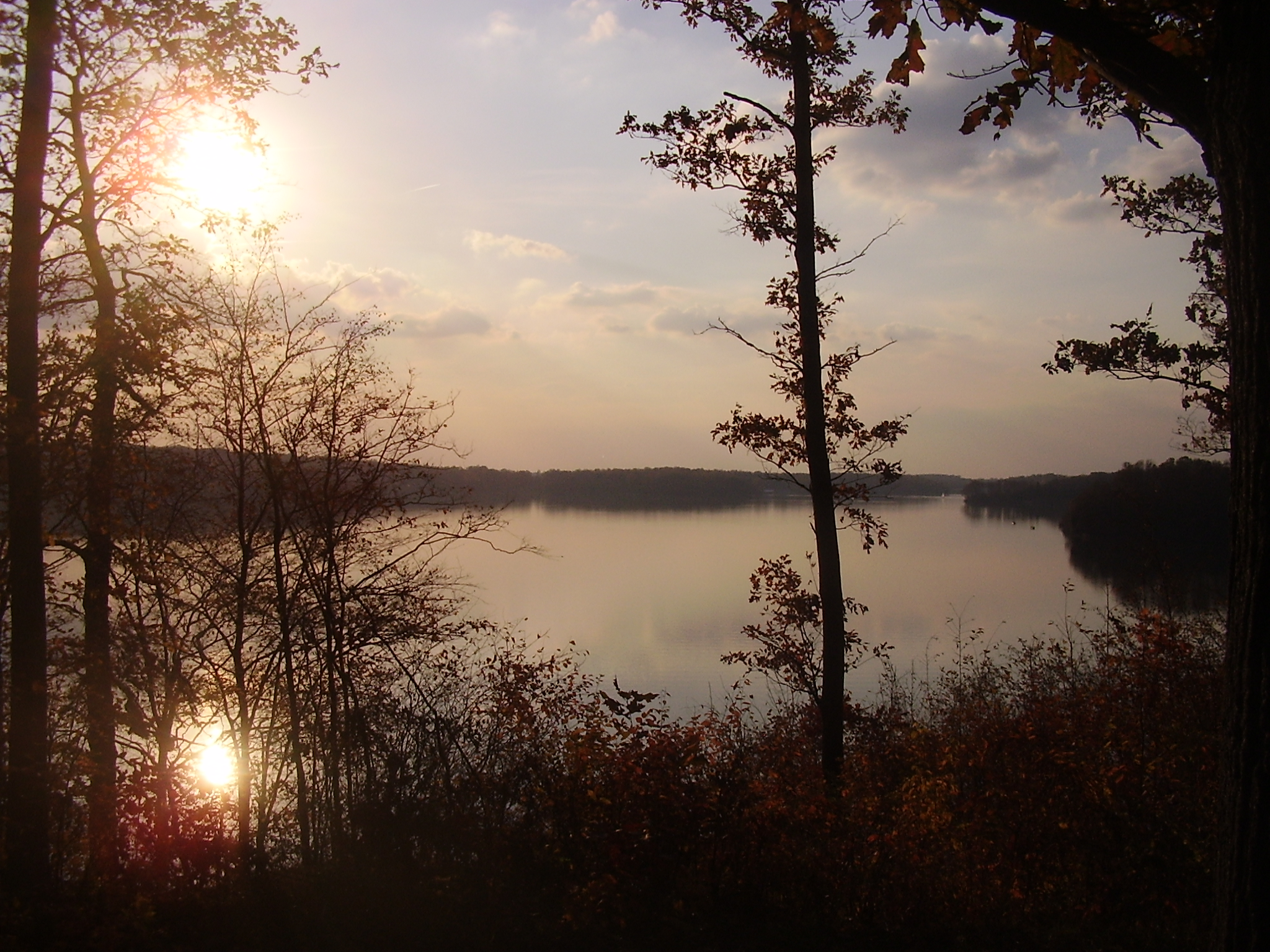 Cowan Lake State Park sunset